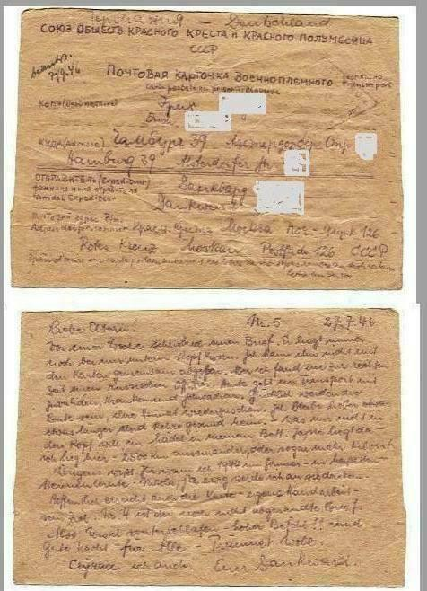 Kriegsgefangenenpost aus der UdSSR Sommer 1946, auf Zementpapier selbst gefertigt